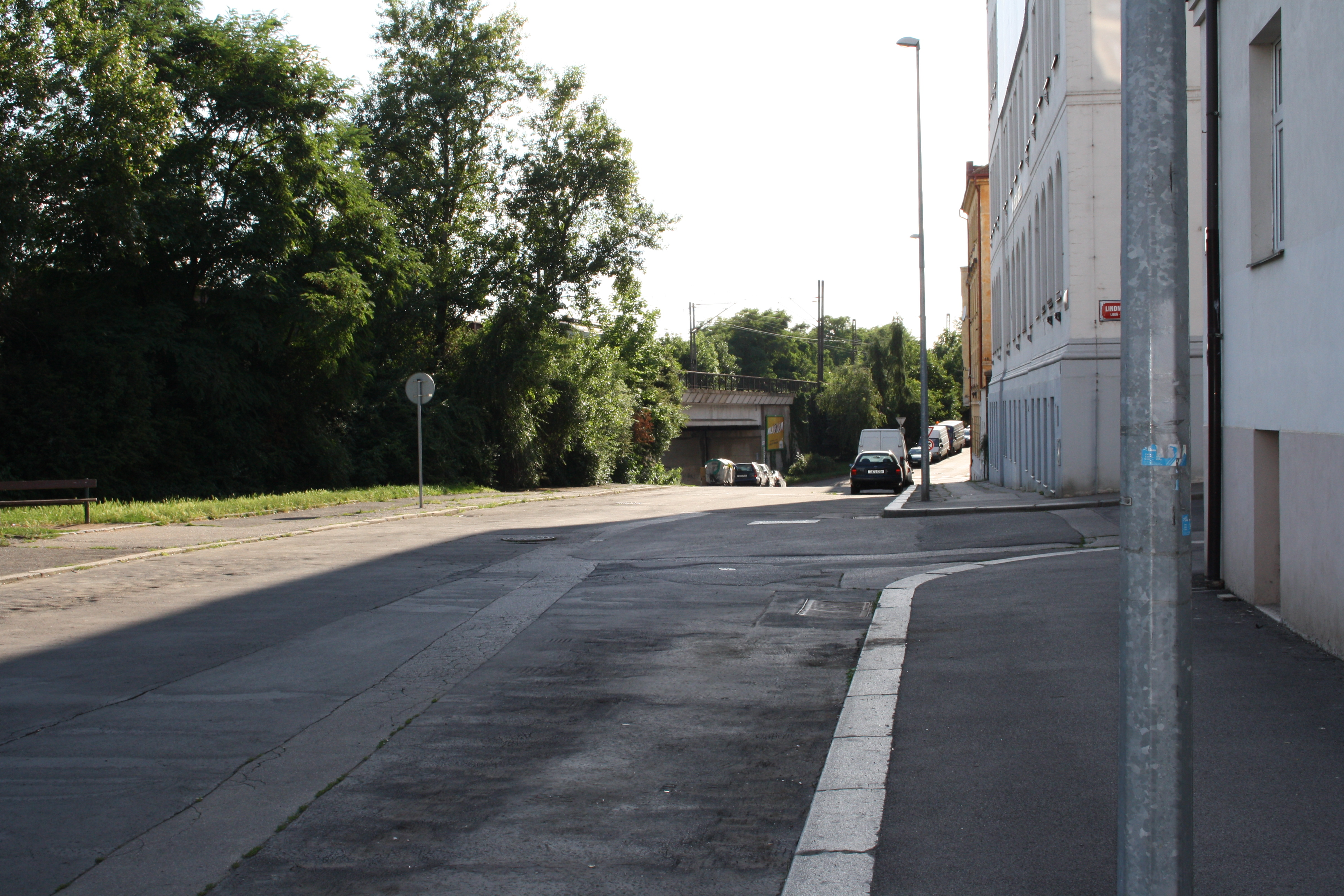 Kandertova, Praha - Libeň, od Lindnerovy k Primátorské, železniční most přes Primátorskou